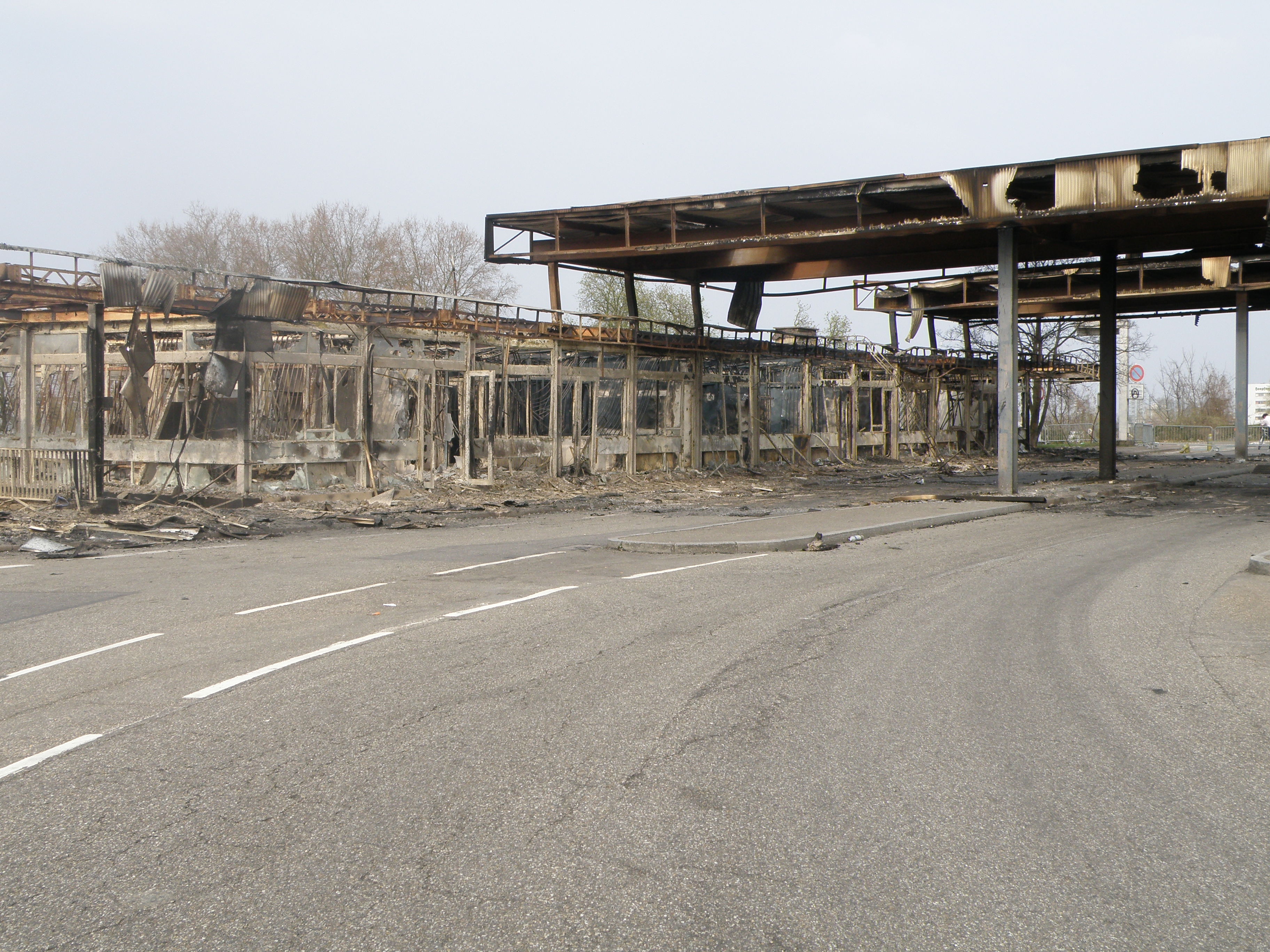 Ancien poste frontière du pont de l'Europe à Strasbourg, après les émeutes du 4 avril 2009 en marge du Sommet de l'OTAN Strasbourg-Kehl.